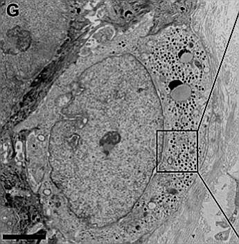 Figura 2. Características inmunohistoquímicas y ultraestructurales de las células fisiológicas de Merkel. G) Micrografía electrónica de una célula de Merkel reveló numerosos gránulos de núcleo denso. Barra de escala G= 2 μm.